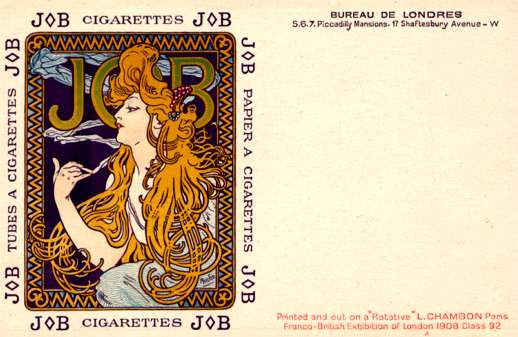 carte postale d'Alfons Mucha pour le papier à cigarettes JOB, éditée lors de l'exposition franco-britannique de Londres en 1908, reprend l'illustration du calendrier JOB de Mucha de 1897